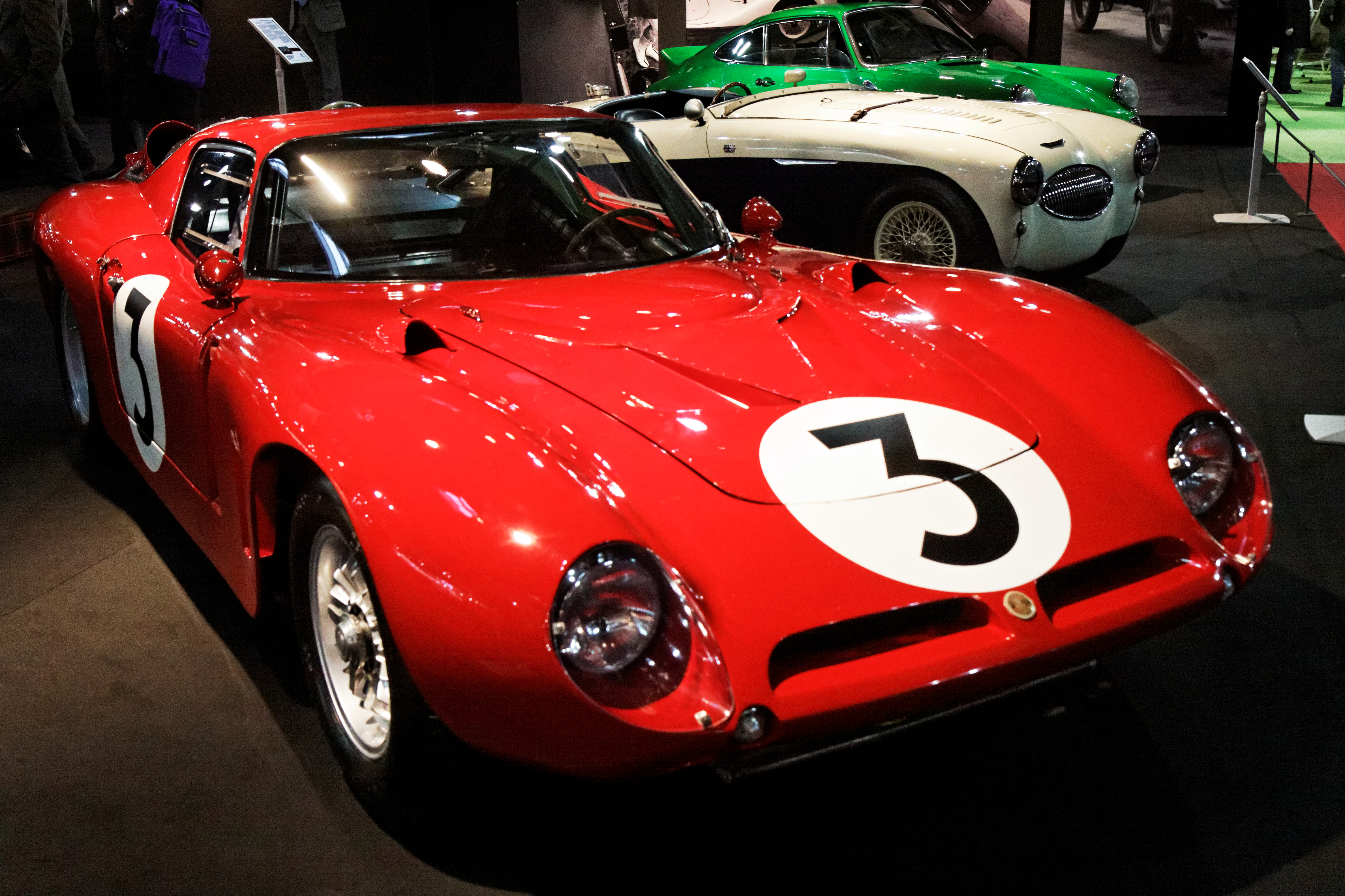 Une Iso Bizzarrini A3 C présentée lors du salon Retromobile 2013.